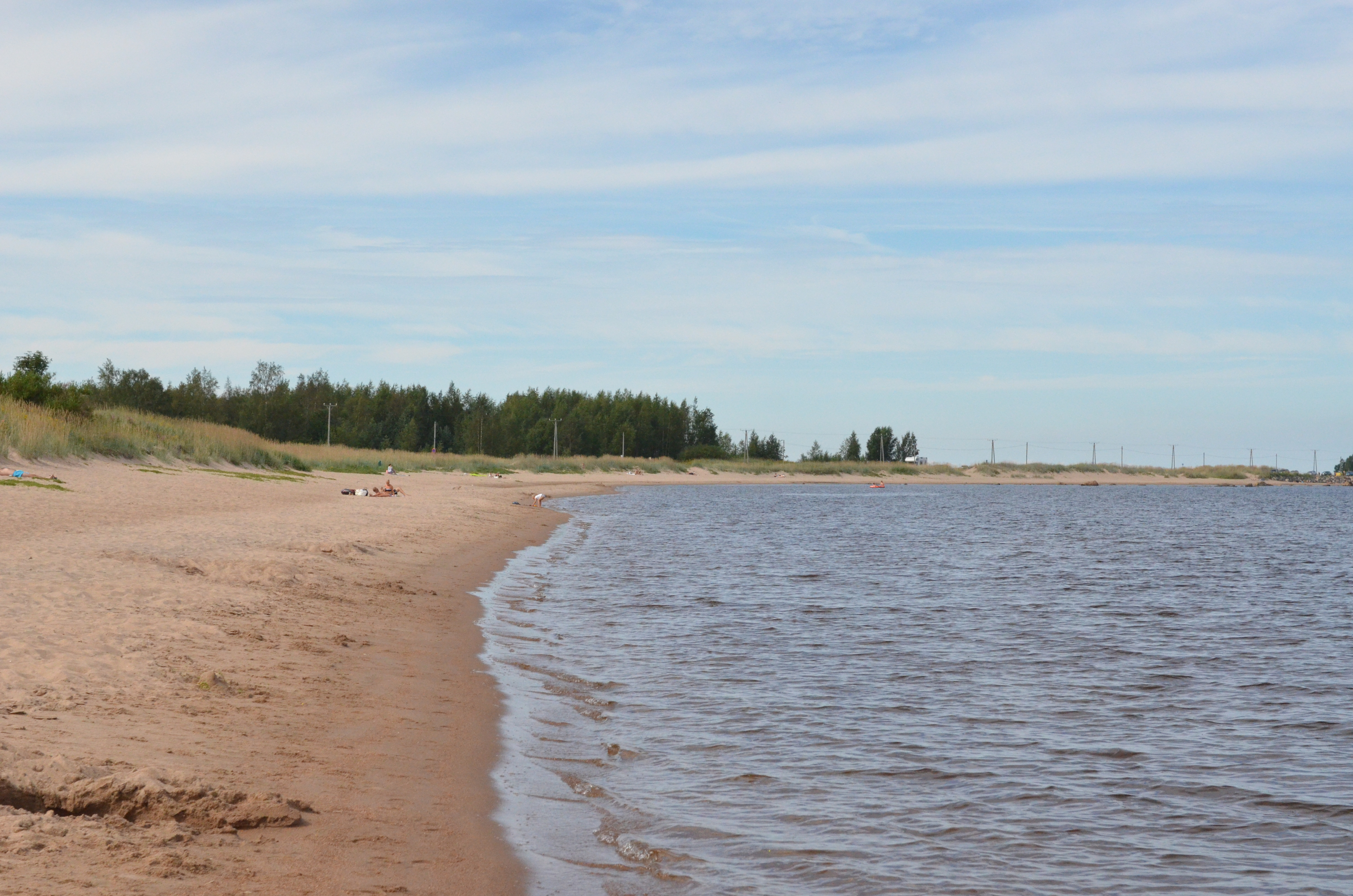 Vattajanniemi